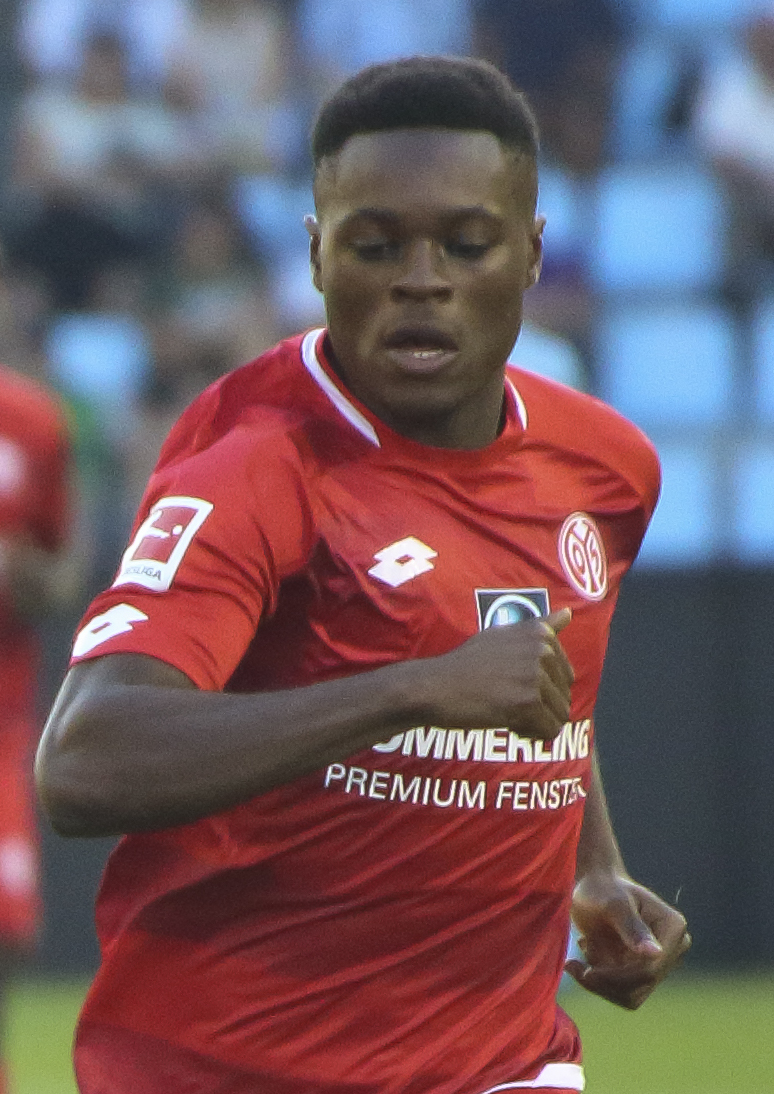 Partido disputado en los aledaños del Estadio de Balaidos, siendo el partido de presentación para el Celta ante su afición para la temporada 2018/2019